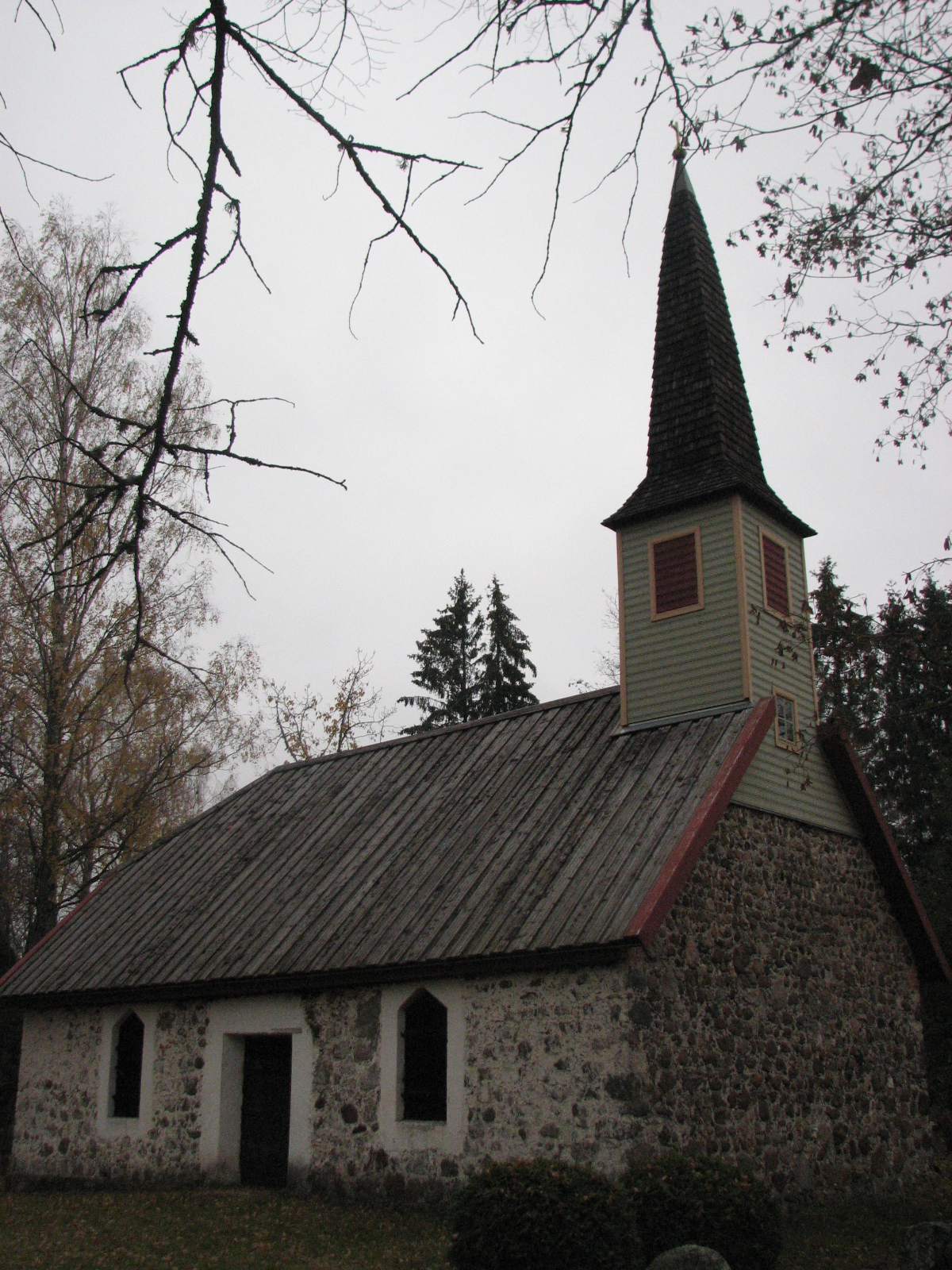 Lohusuu, Estonia